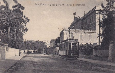 Sanremo, tram in corso Cavallotti